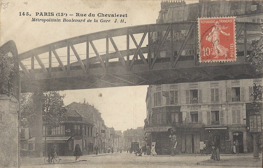 Rue du Chevaleret dans le treizième arrondissement de Paris début 1900.